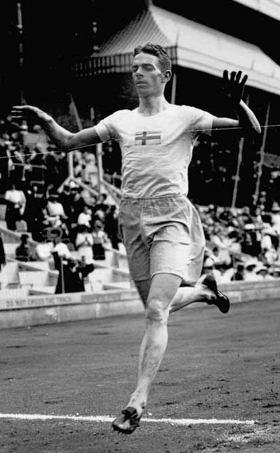 Ernst Wide, Stockholm Olympics